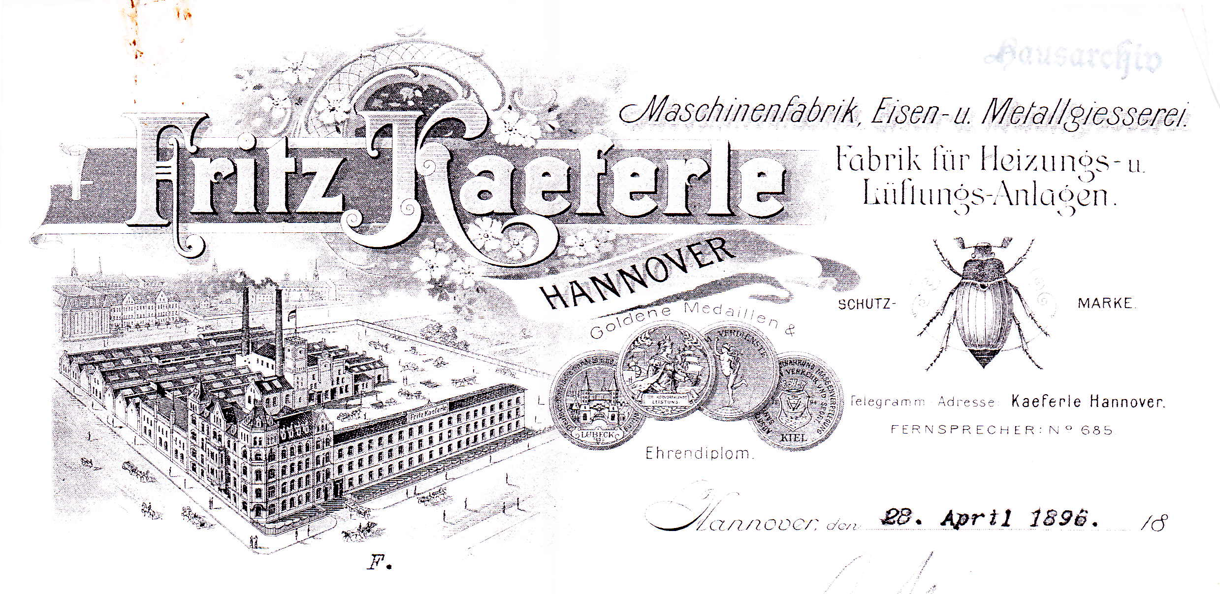 Briefkopf der Maschinenfabrik, Eisen- und Metallgießerei, Fabrik für Heizungs- und Lüftungs-Anlagen Fritz Kaeferle, mit einer gestochenen Abbildung aus der Vogelschau-Perspektive des Fabrik-Komplexes mit den Hallen und Industrieschornsteinen des Unternehmens, dessen bis heute erhaltenes Eckgebäude unter der Adresse Jakobistraße 9 Ecke Edenstraße unter Denkmalschutz steht. Mit dem Hinweis auf Medaillen und ein Ehrendiplom ist rechts im Briefkopf ein Maikäfer als Schutzmarke der Firma zu sehen ...